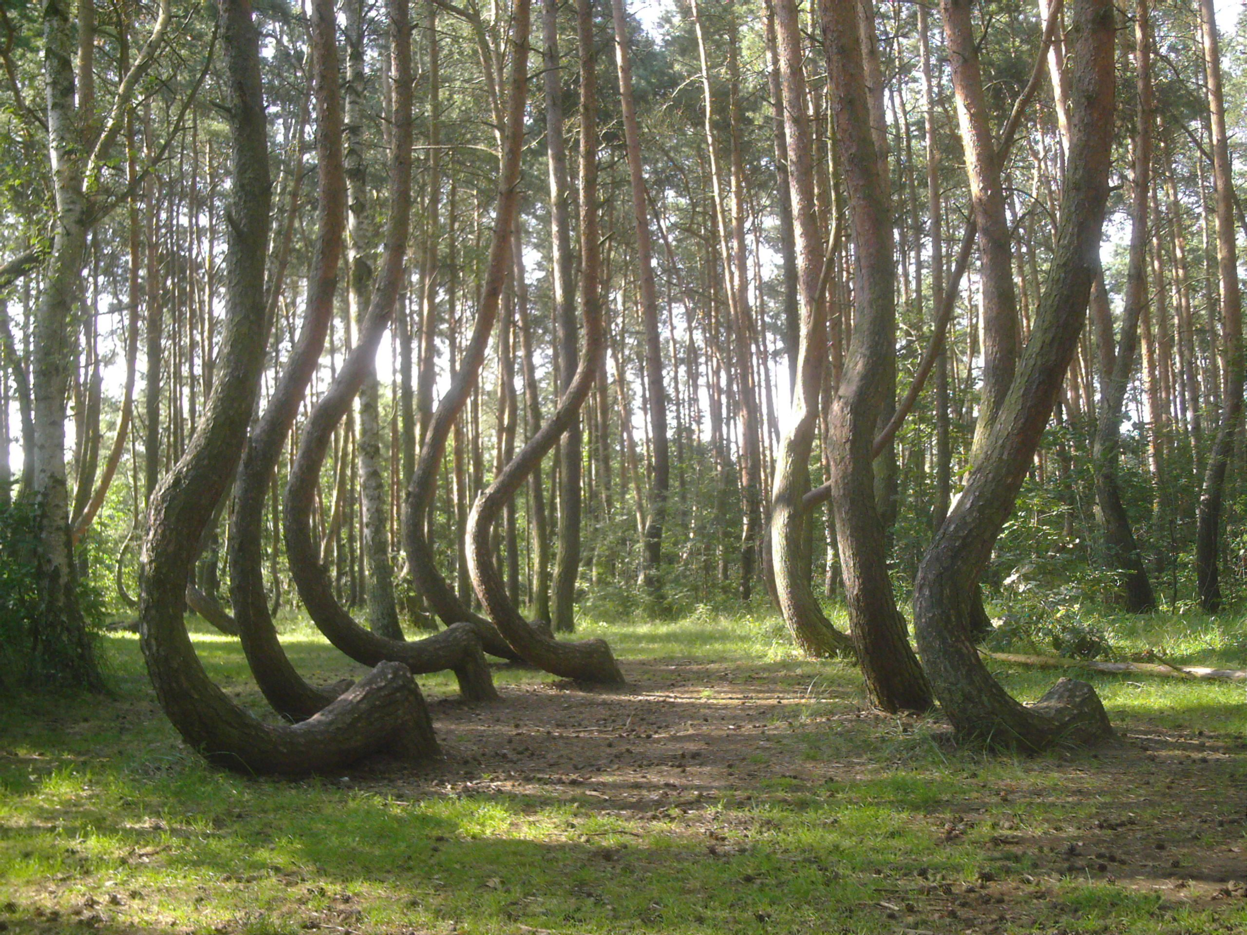 Krzywy Las w Nowym Czarnowie (województwo zachodniopomorskie).